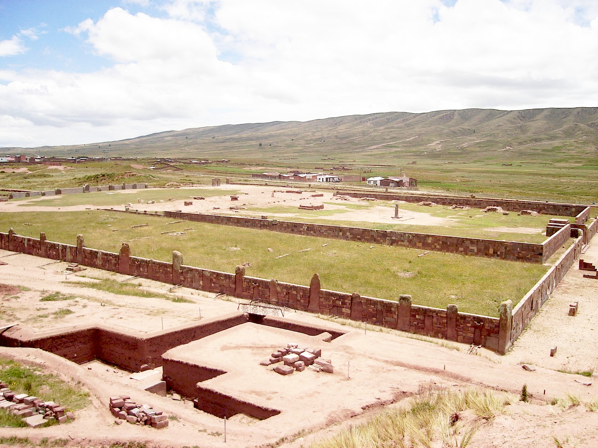 Foto tirada por mim, em Tiwanaku.